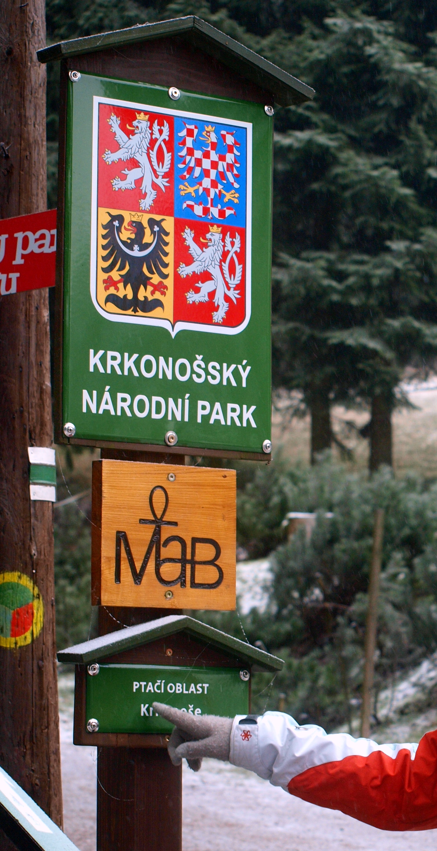 MaB Krkonoše